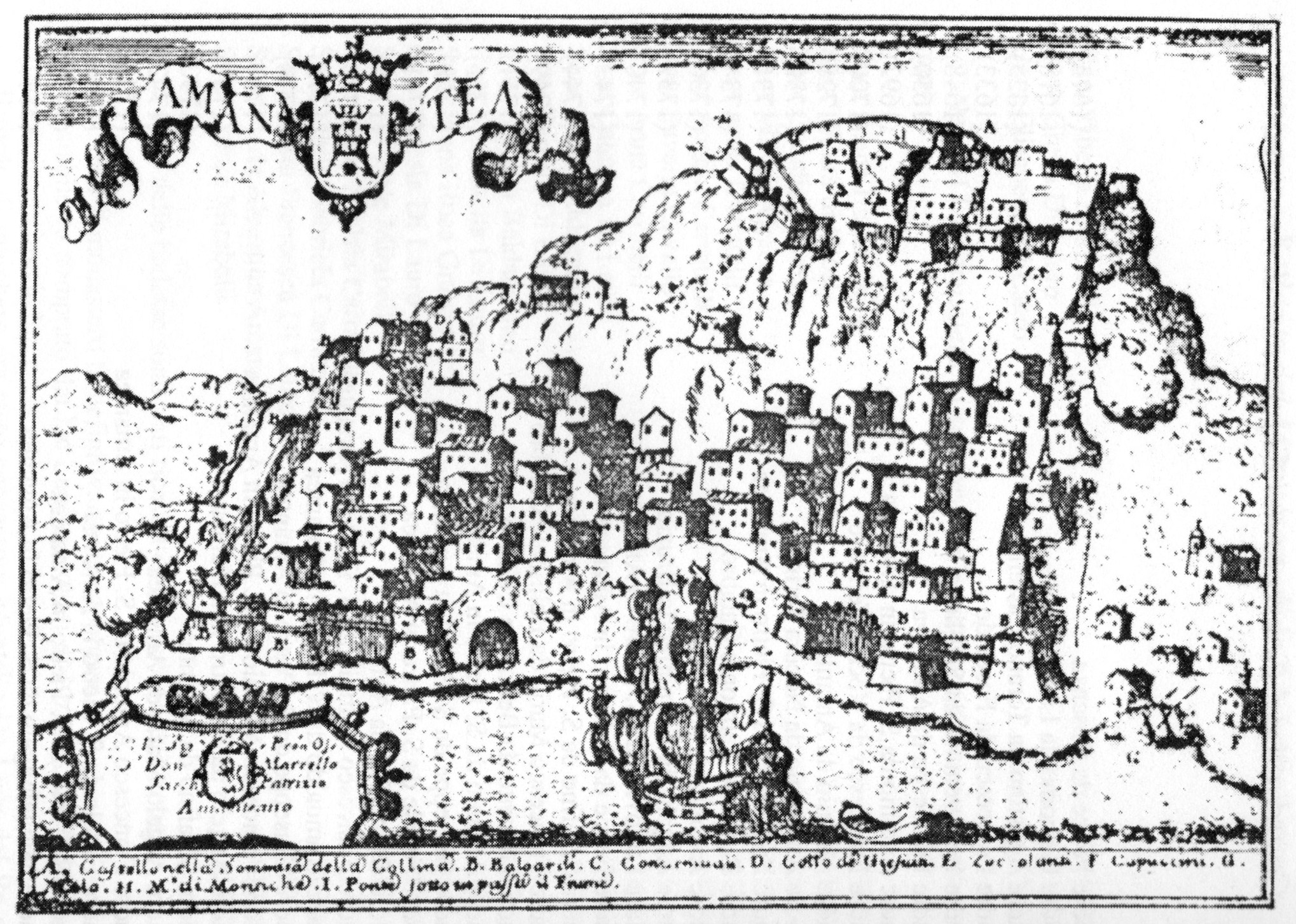 Veduta della città di Amantea (Cosenza) nel 1700